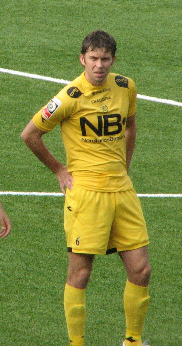 Stian_Theting (Glimt) under oppstillingen til BOdø/Glimt-Sogndal